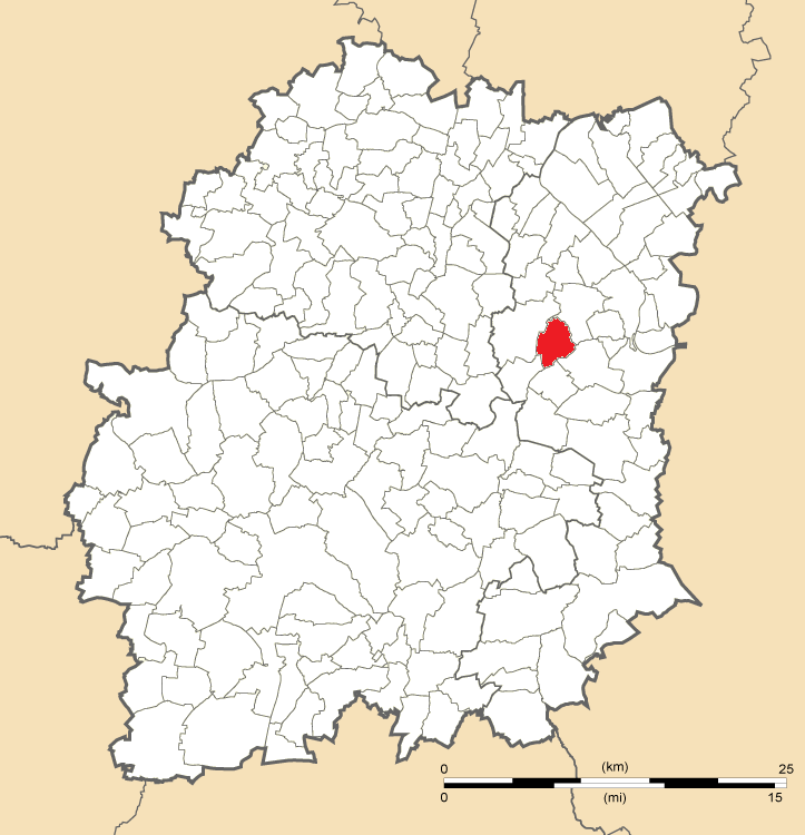 Carte de position d'Écharcon en Essonne (91)